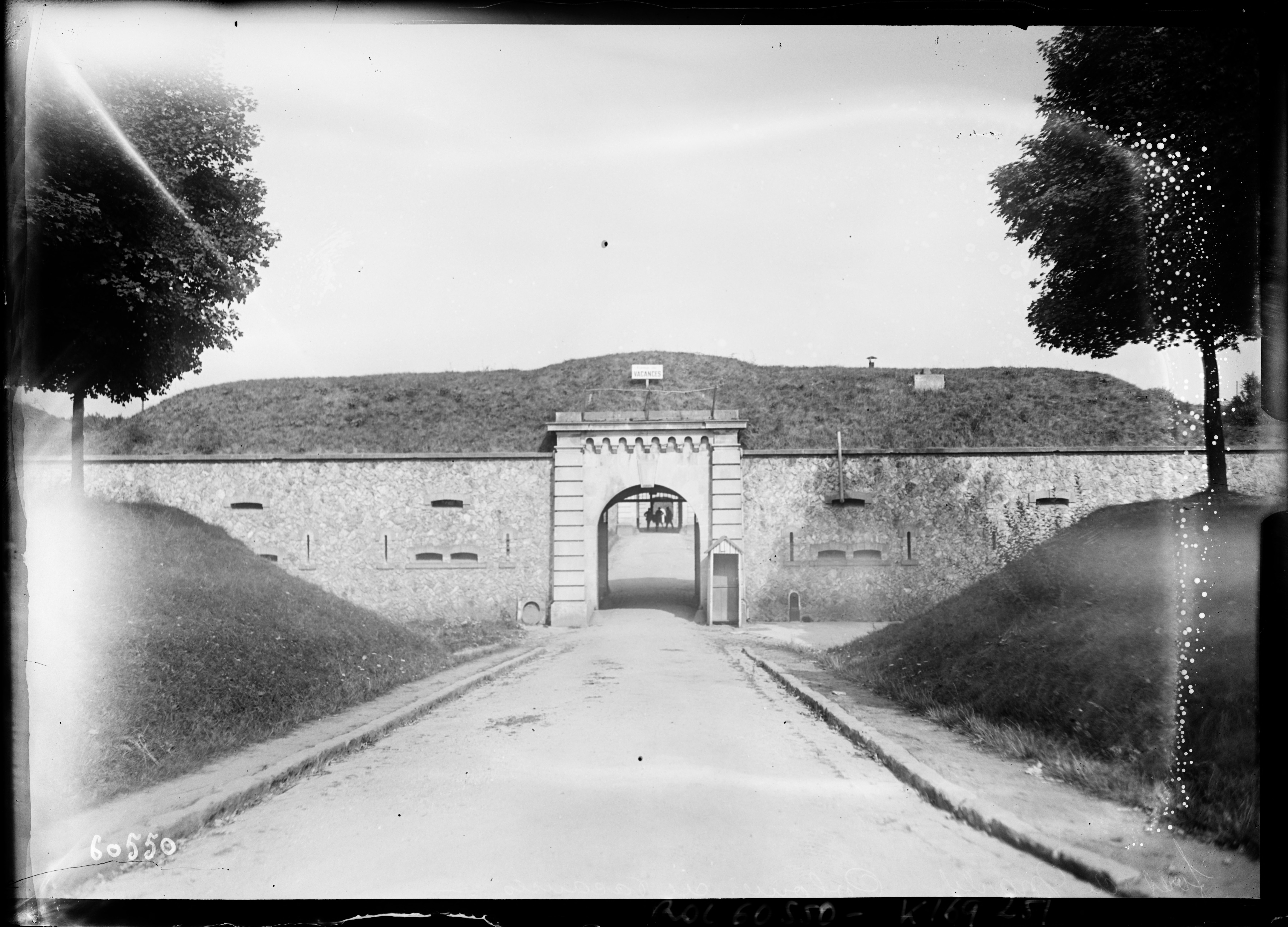 Forêt de Marly, colonie de vacances : fort du trou d'Enfer.